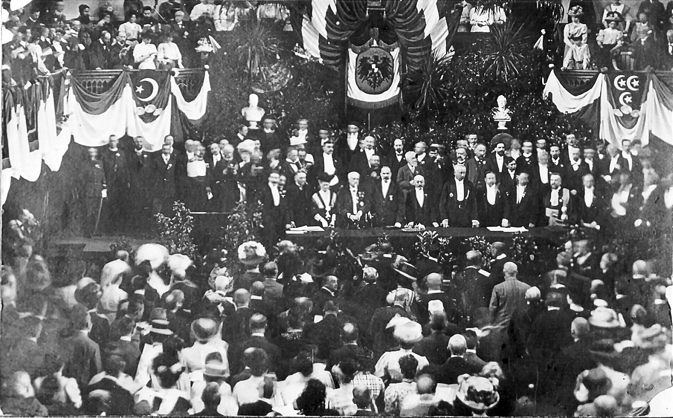 4. Esperanto-Weltkongress, Dresden 1908. Malferma kunsido (Eröffnungsfeierlichkeit). Blick über die Anwesenden aufs Podium. Zu sehen u.a. Marie Hankel und Ludwik L. Zamenhof.